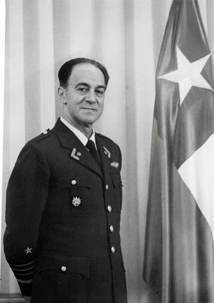 Gustavo Leigh Guzmán.